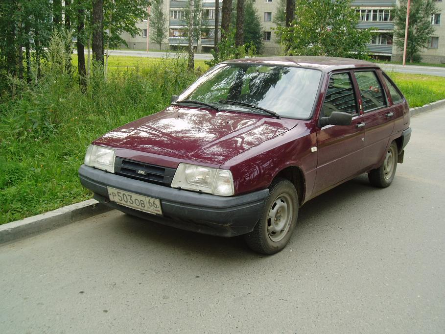 Izh Oda Taken in Zarechny in 2005 (Sverdlovsk oblast)